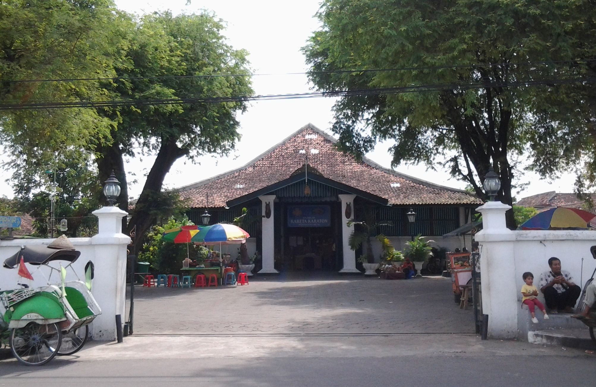 Museum Kareta Karaton atau Museum Kereta Keraton Ngayogyakarta Hadiningrat.